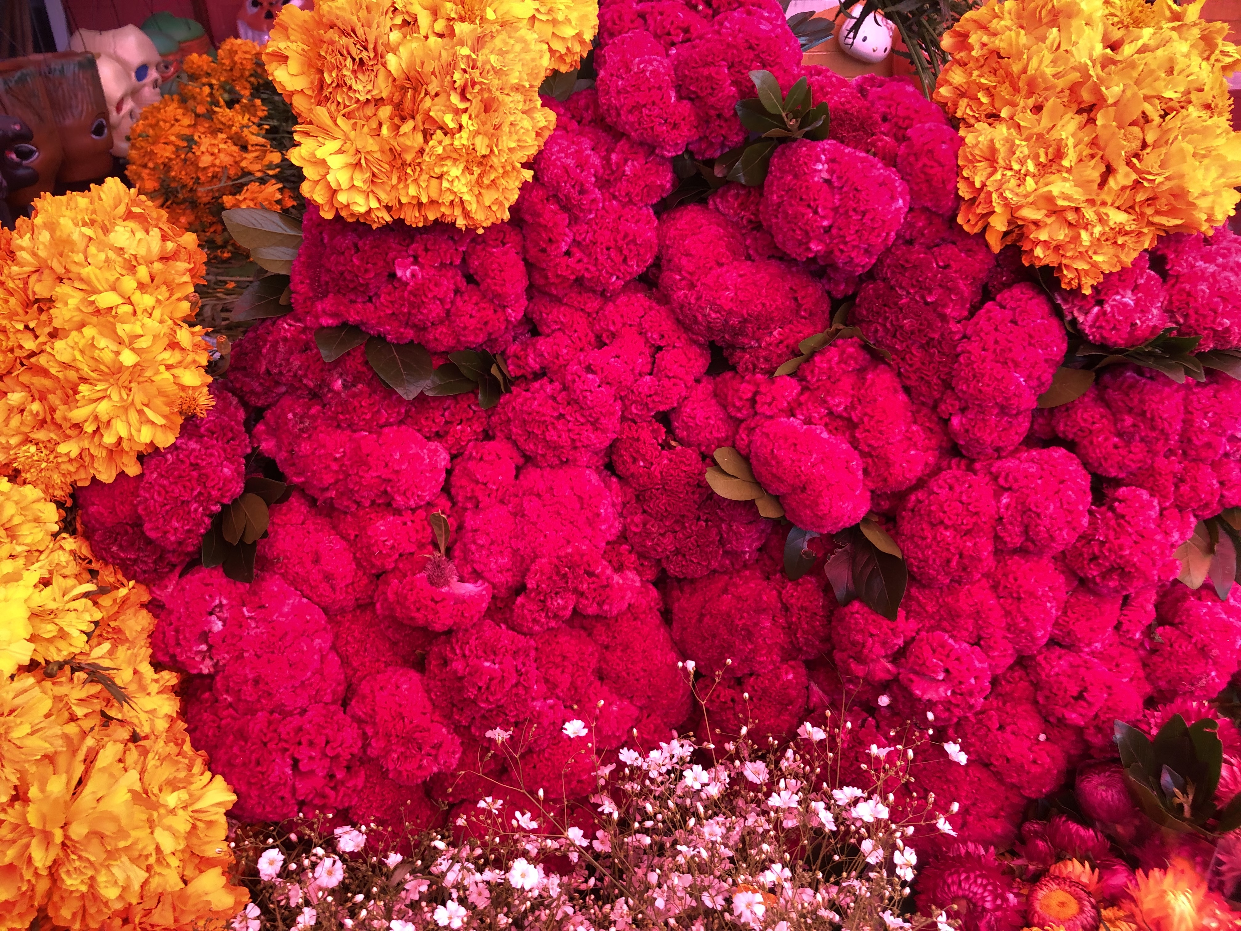 Flores para dia de muertos